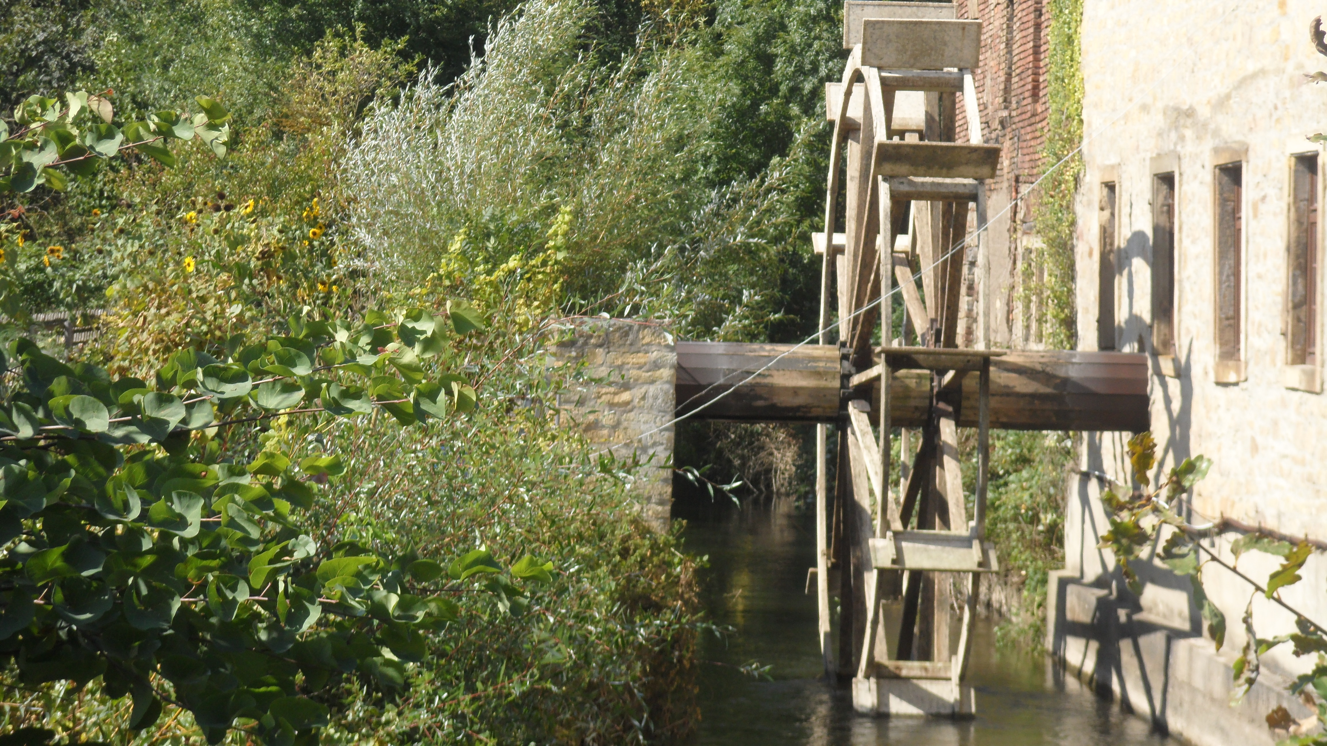 Bad Sobernheim;ehemalige Stadtmühle - der Wassergraben und das Wasserrad.